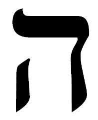 hebrew letter he